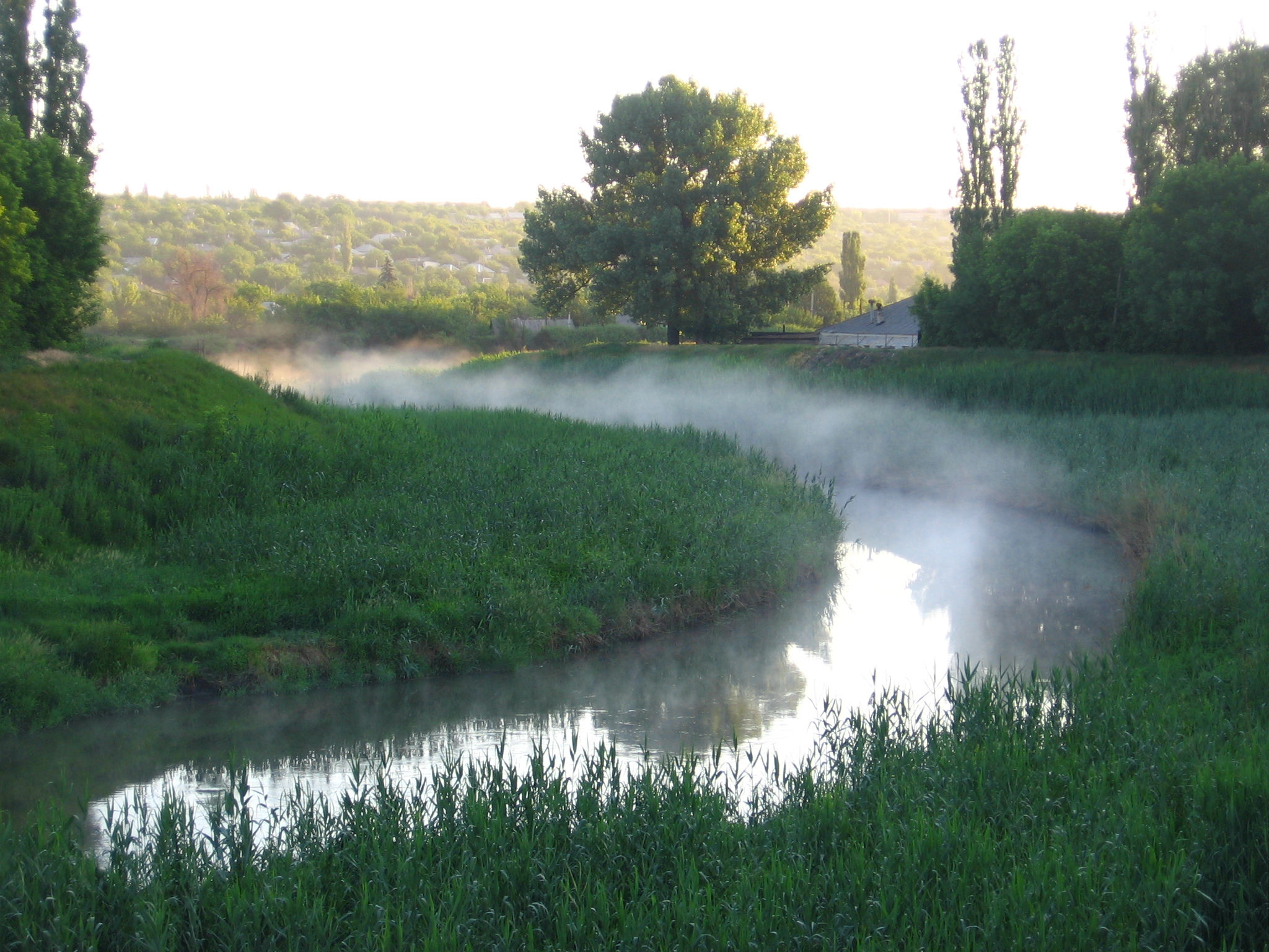 Luhanka River in mist